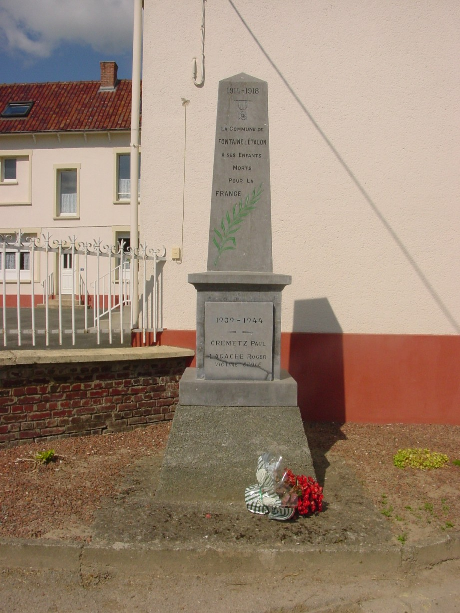 Monument aux morts de Fontaine l'Etalon